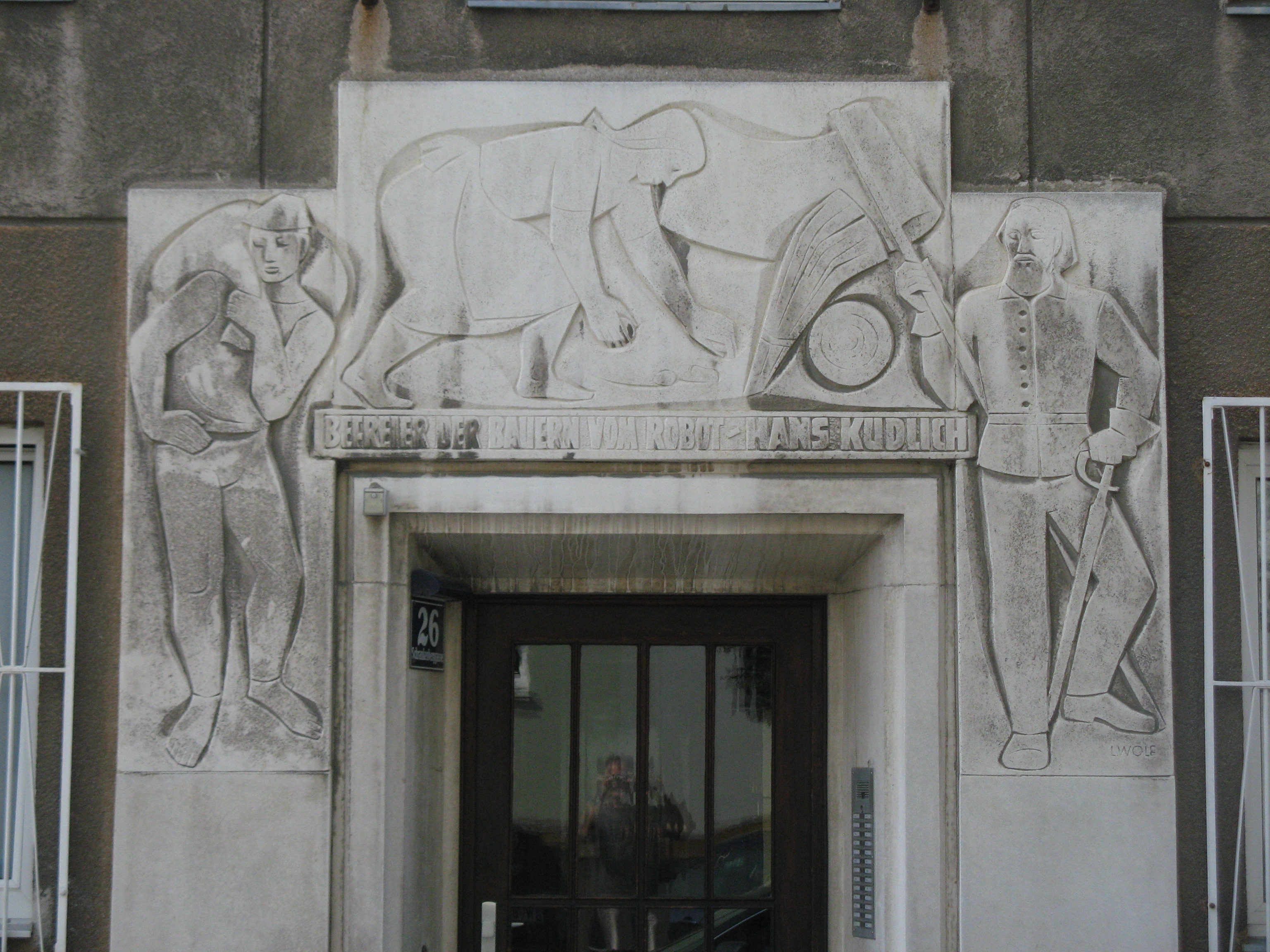 Befreier der Bauern vom Robot - Hans Kudlich (1954-55), Relief von L. Wolf, Schrankenberggasse 26, Wien-Favoriten